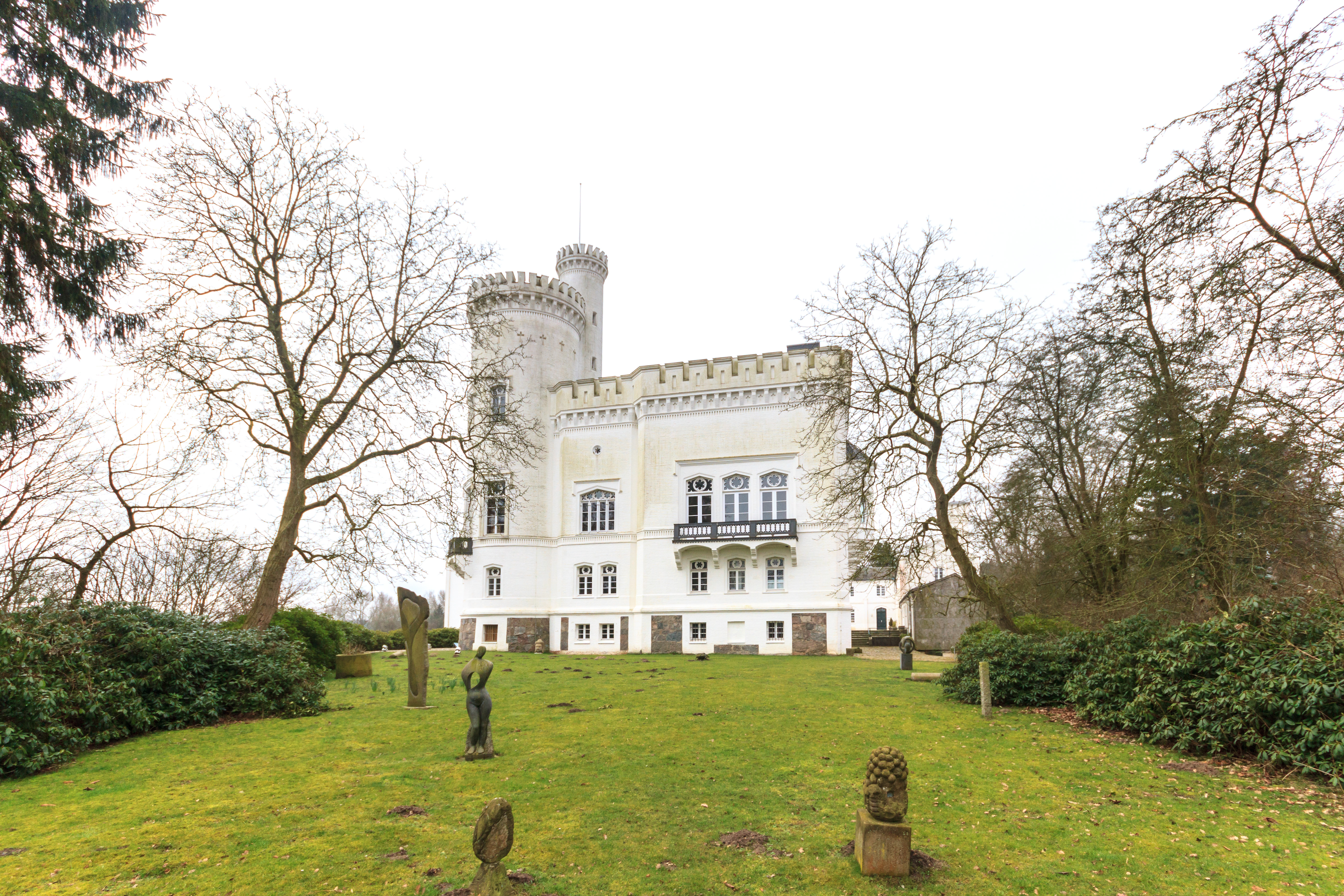 Blomenburg